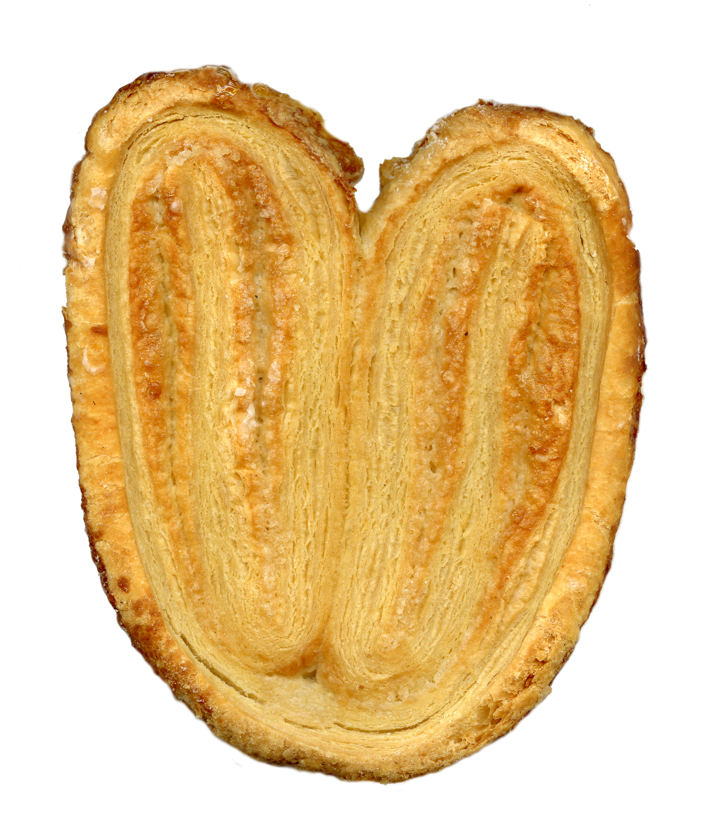 Schweinsohr (Palmier) aus Blätterteig